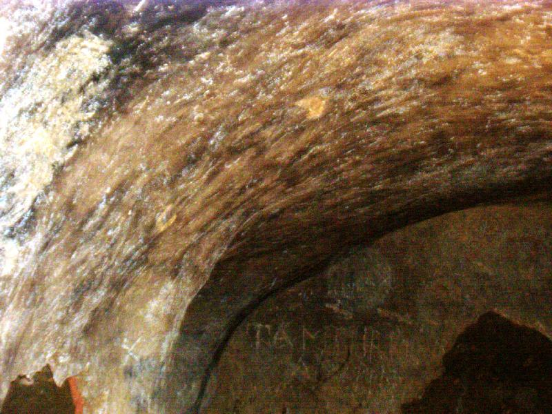 Catacombe ebraiche di Venosa